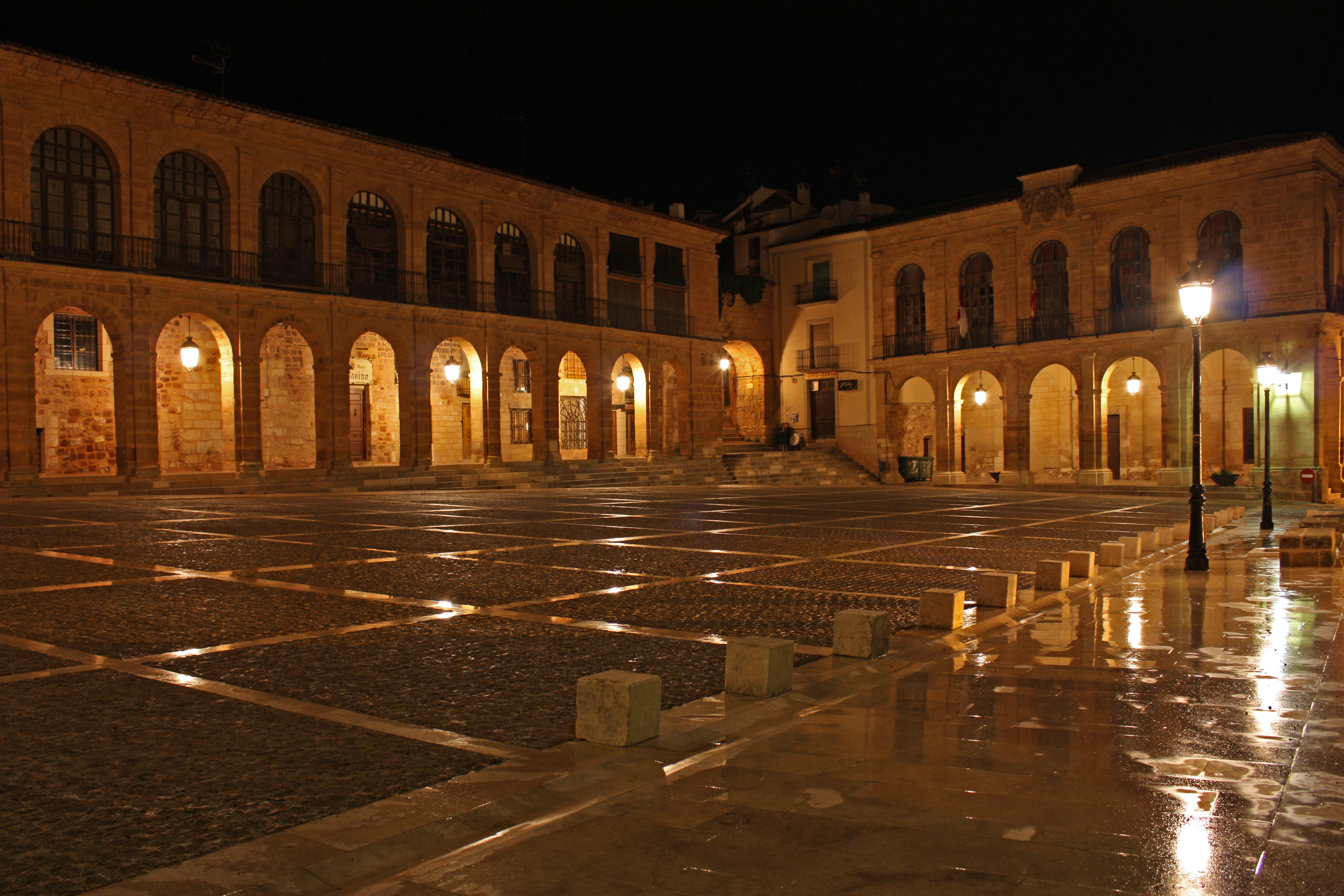 Obra de Andrés de Vandelvira. La Plaza Mayor de Alcaraz representa uno de los monumentos renacentistas más significativos de España.